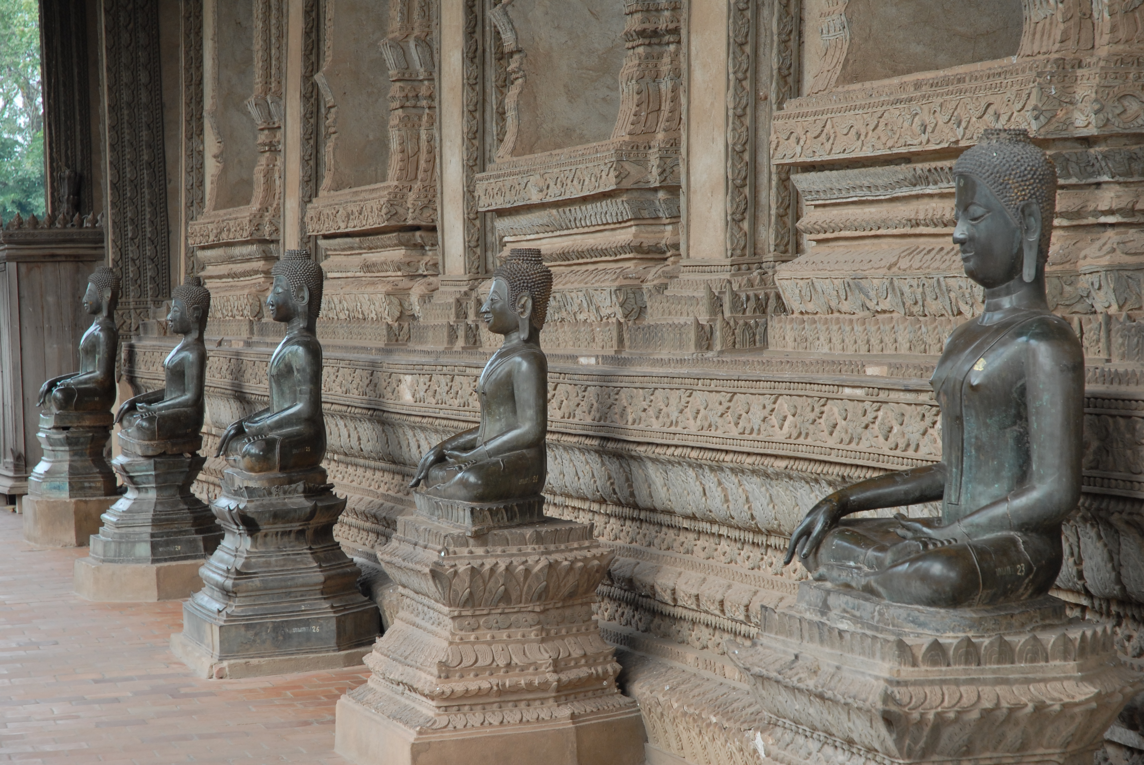 Vat Phra Kèo à Vientiane : Bouddhas ornant la galerie extérieure